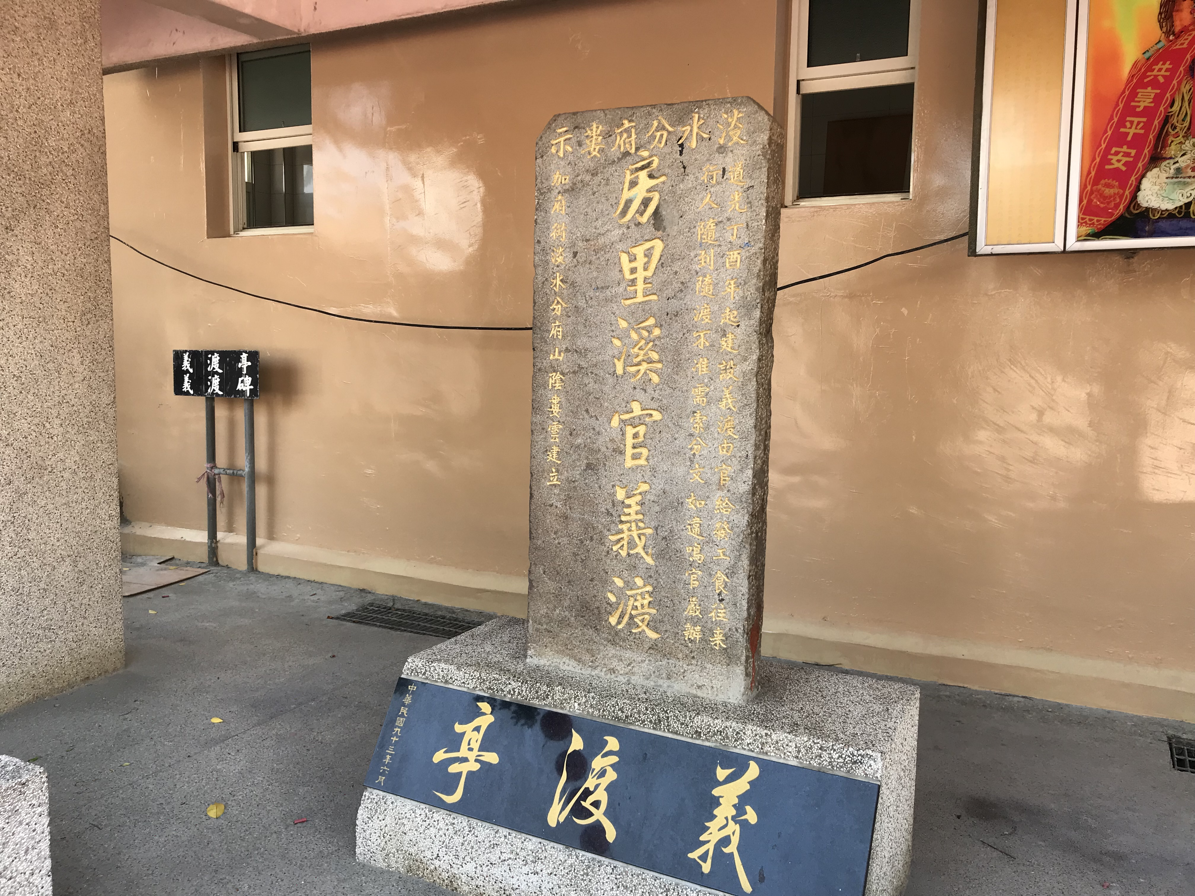 中文（台灣）: 房裡溪官義渡示禁碑